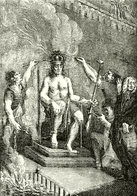 Dózsa György megkoronázása